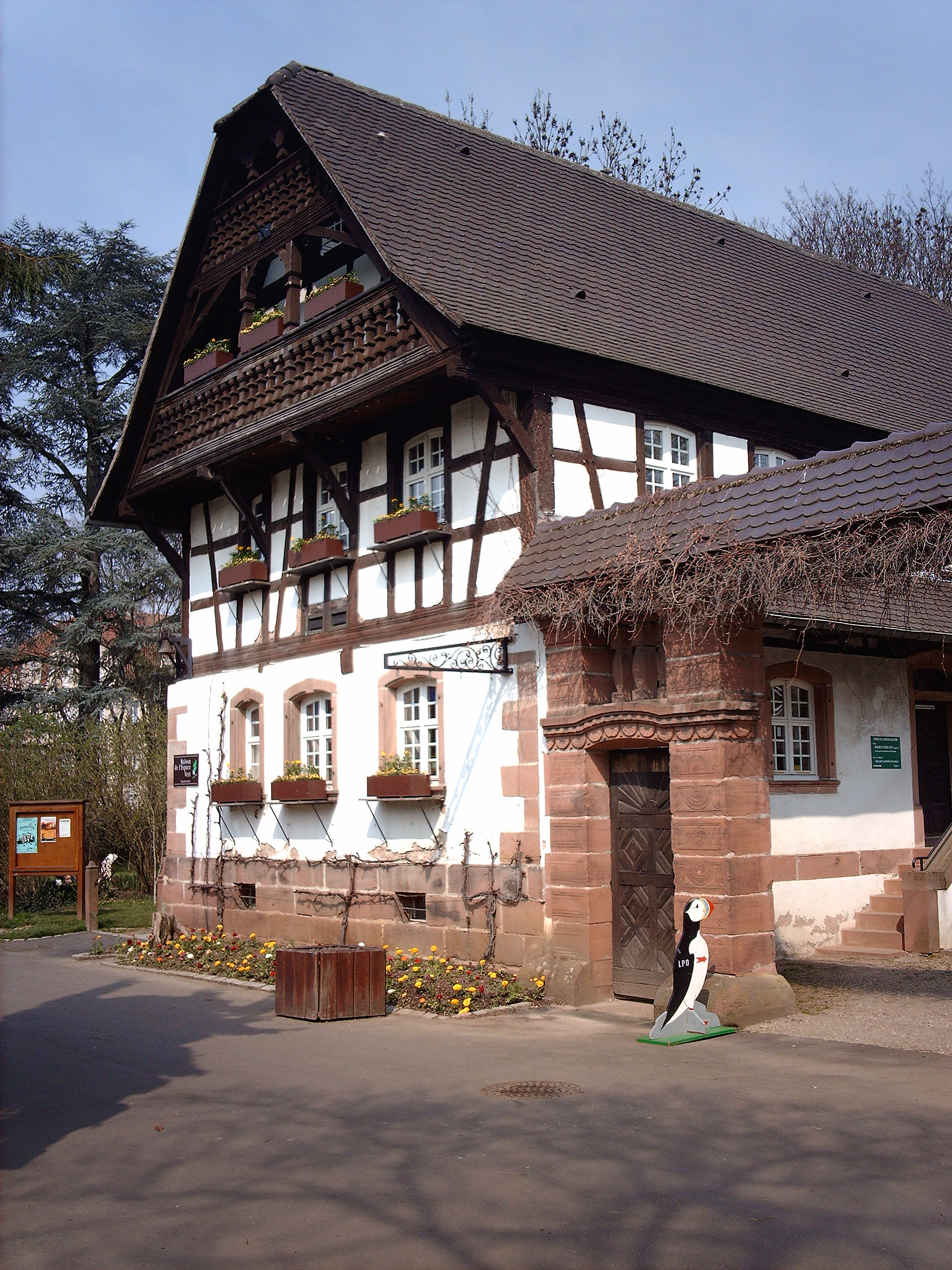 Photo de la maison de l'espace vert du Parc Ste-Marie de Nancy(France-54), dite maison alsacienne suite à l4exposition universelle de l'Est de la France de 1909.